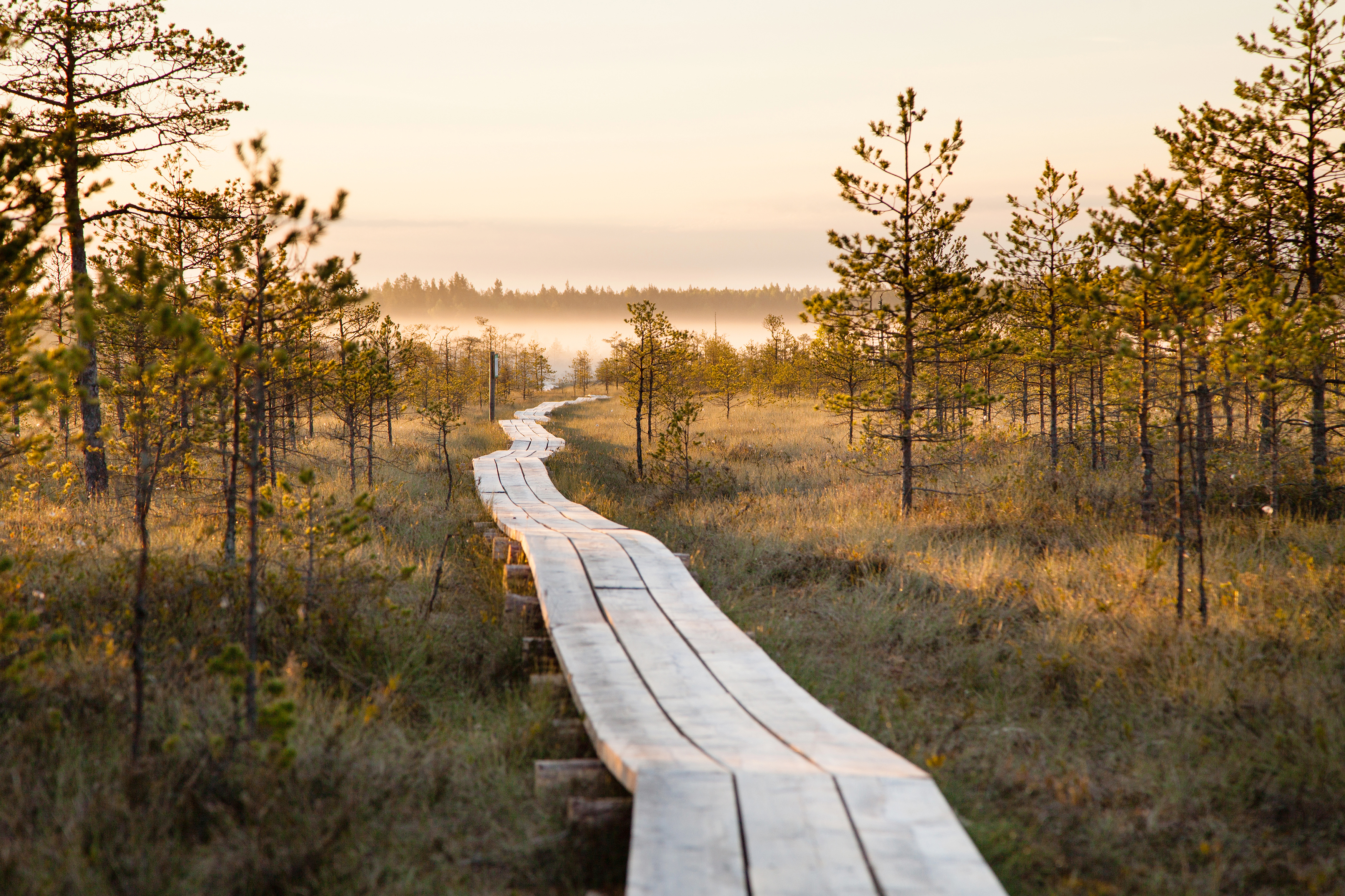 Meenikunno maastikukaitseala